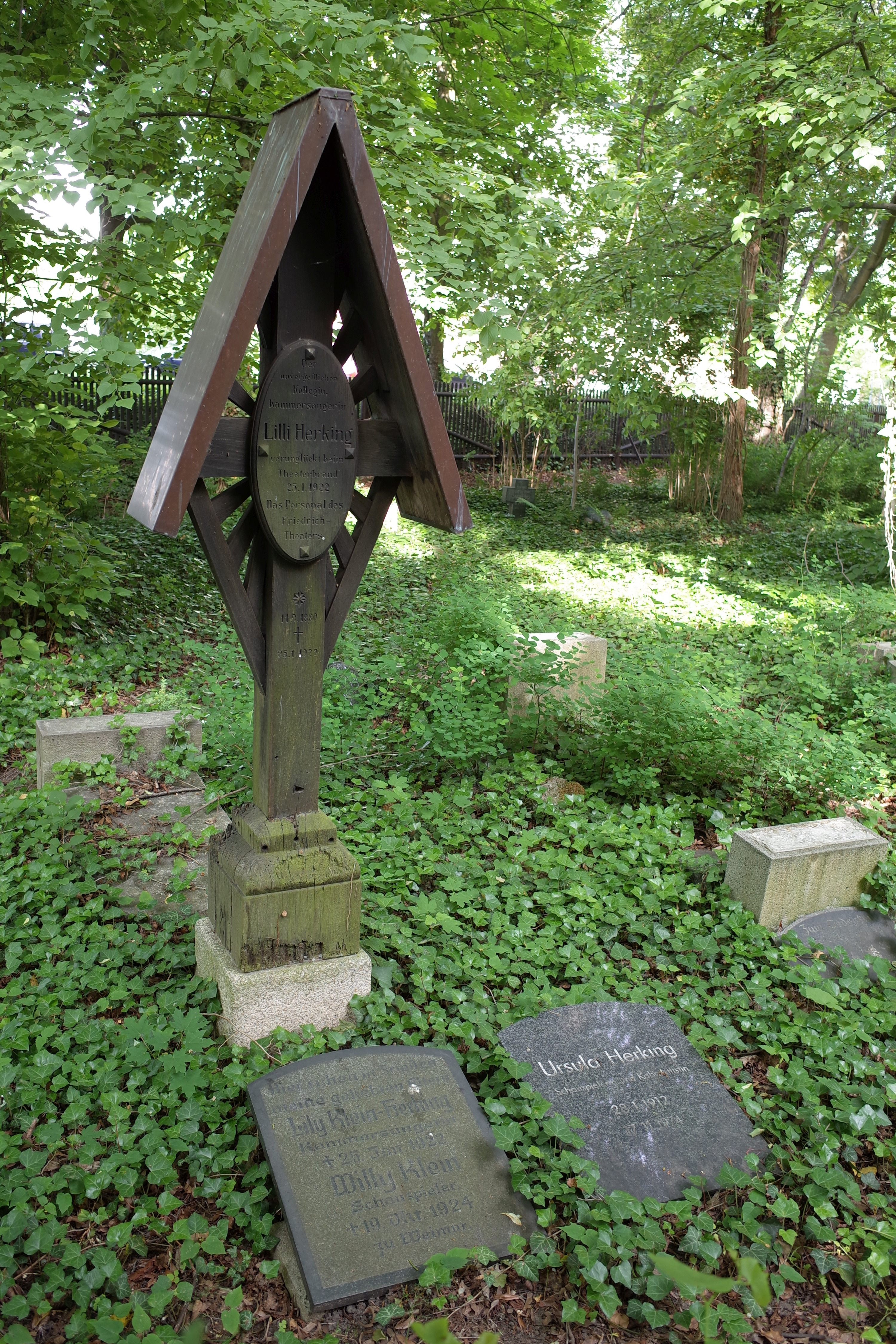 Ruhestätte von Lily Klein-Herking, Willy Klein und Ursula Herking auf dem Friedhof 3 in Dessau